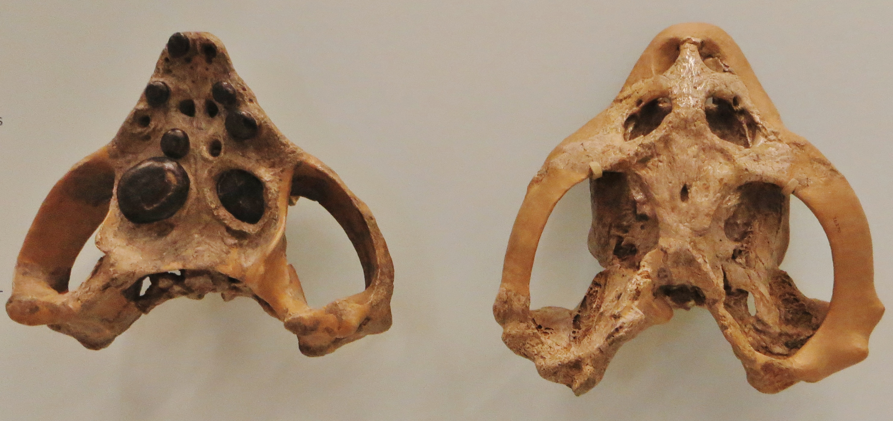 Fossil of Cyamodus- Took the picture at Museum am Lowentor, Stuttgard